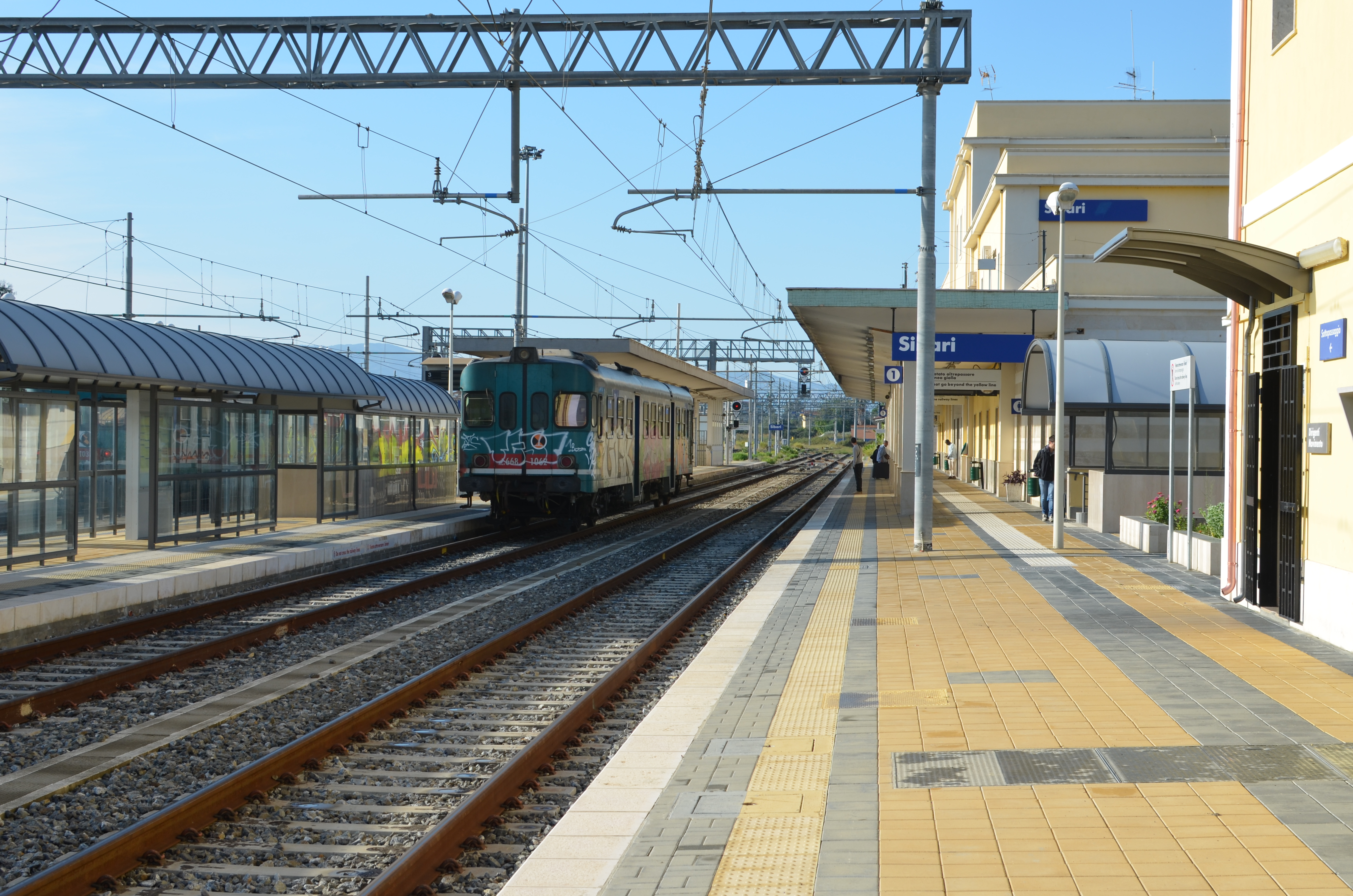 Stazione ferroviaria di Sibari. È in sosta un'automotrice ALn 668.